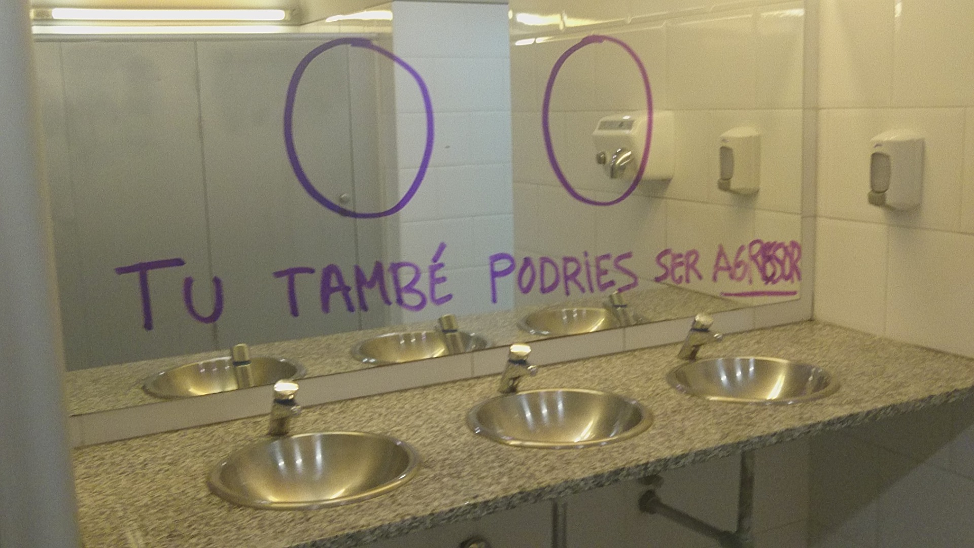 Pintada en un dels lavabos d'homes, al campus de Ciutadella de la Universitat Pompeu Fabra, en motiu del 25 de novembre, Dia internacional per a l'eliminació de la violència contra la dones, de 2015.